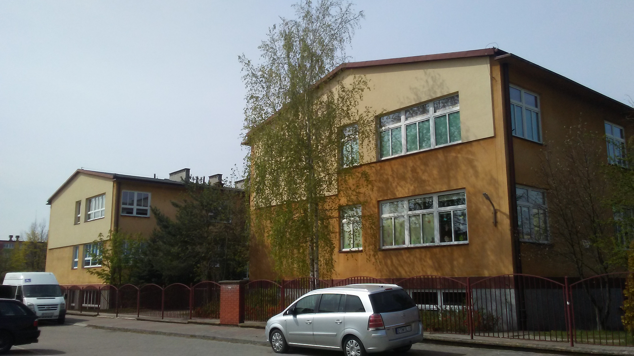 Szkoła Podstawowa nr 1 im Aleksandra Kamińskiego w Tomaszowie Mazowieckim, ulica Leona Maya na Osiedlu Hubala II